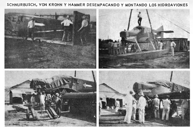 En Agosto 6 de 1920 en los hangares de SCADTA, el Jefe de pilotos Fritz Hammer, el ingeniero Wilhelm Schnurbusch y el piloto Hellmuth von Krohn comienza a ensamblar los dos hidroaviones Junkers F-13. Los aviones y ellos habían llegado el día de 4 a Puerto Colombia.